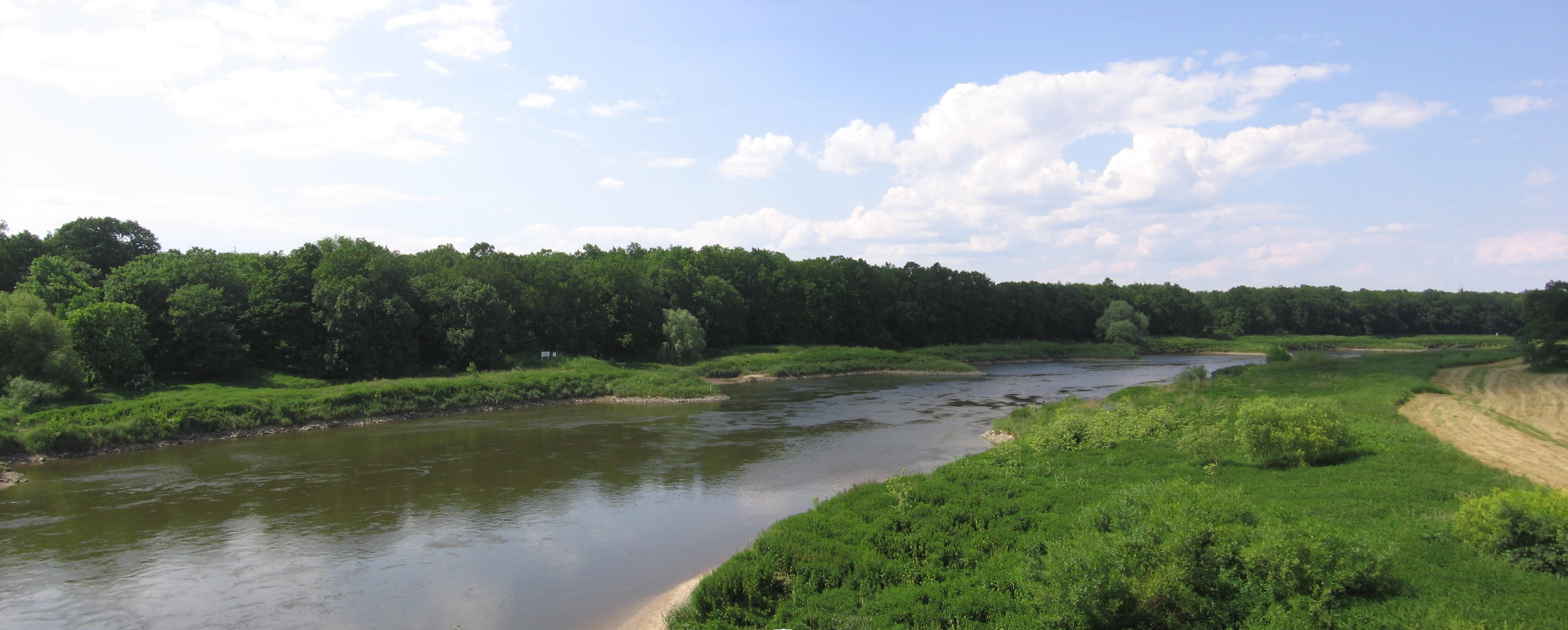 Odra widziana z z drogi nr 338 obok mostu przez rzekę, z prawego brzegu (gmina Wołów)